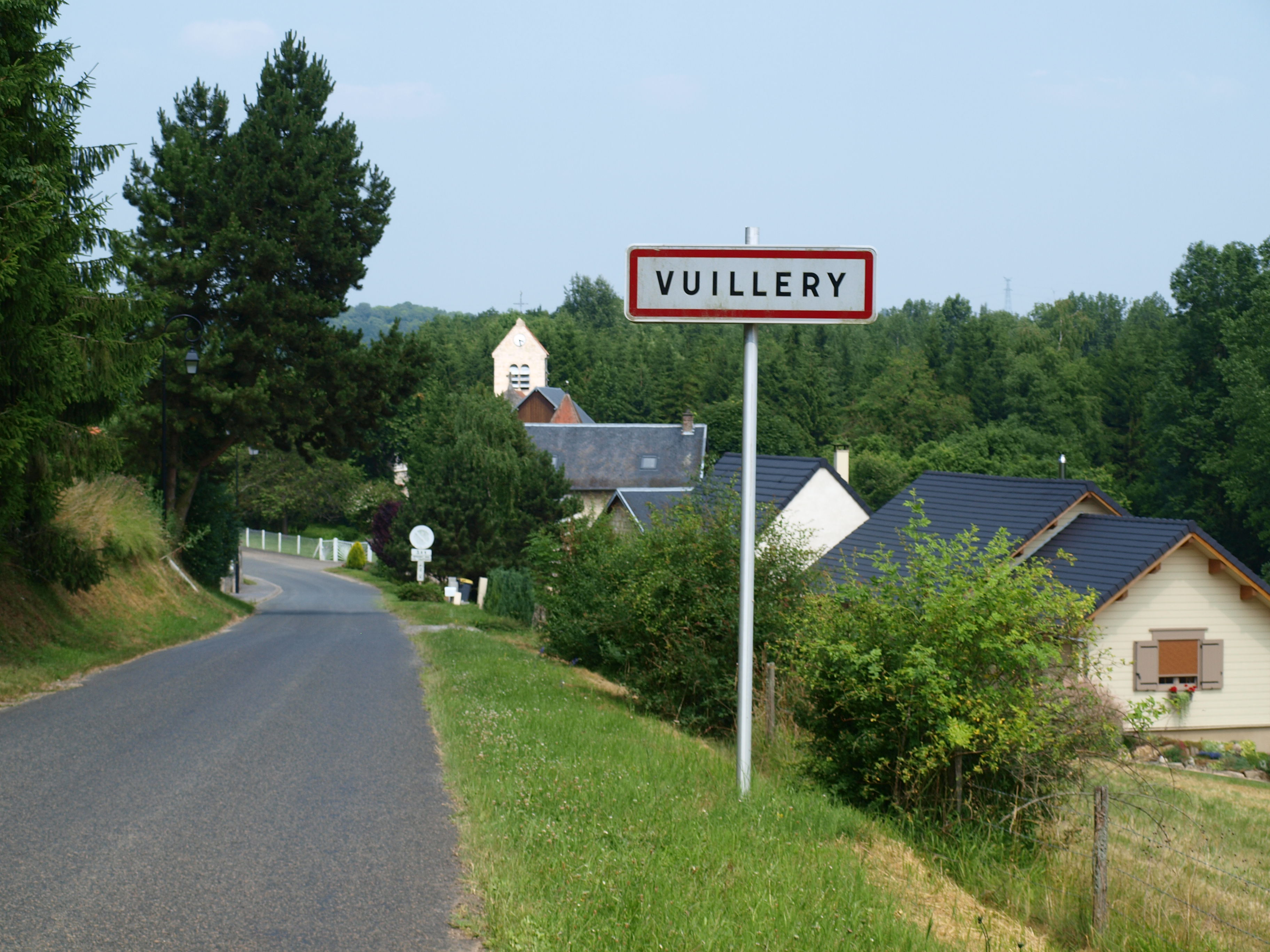 Vuillery (Aisne, France)